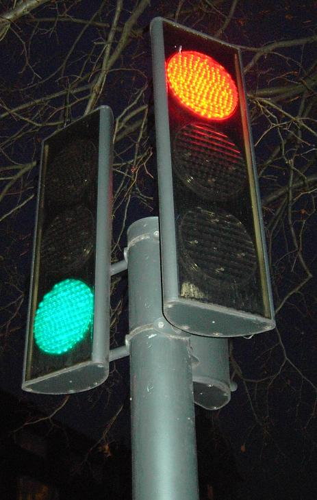 LED-Ampel in Odense (Dänemark)